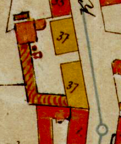 Welhavens gate da